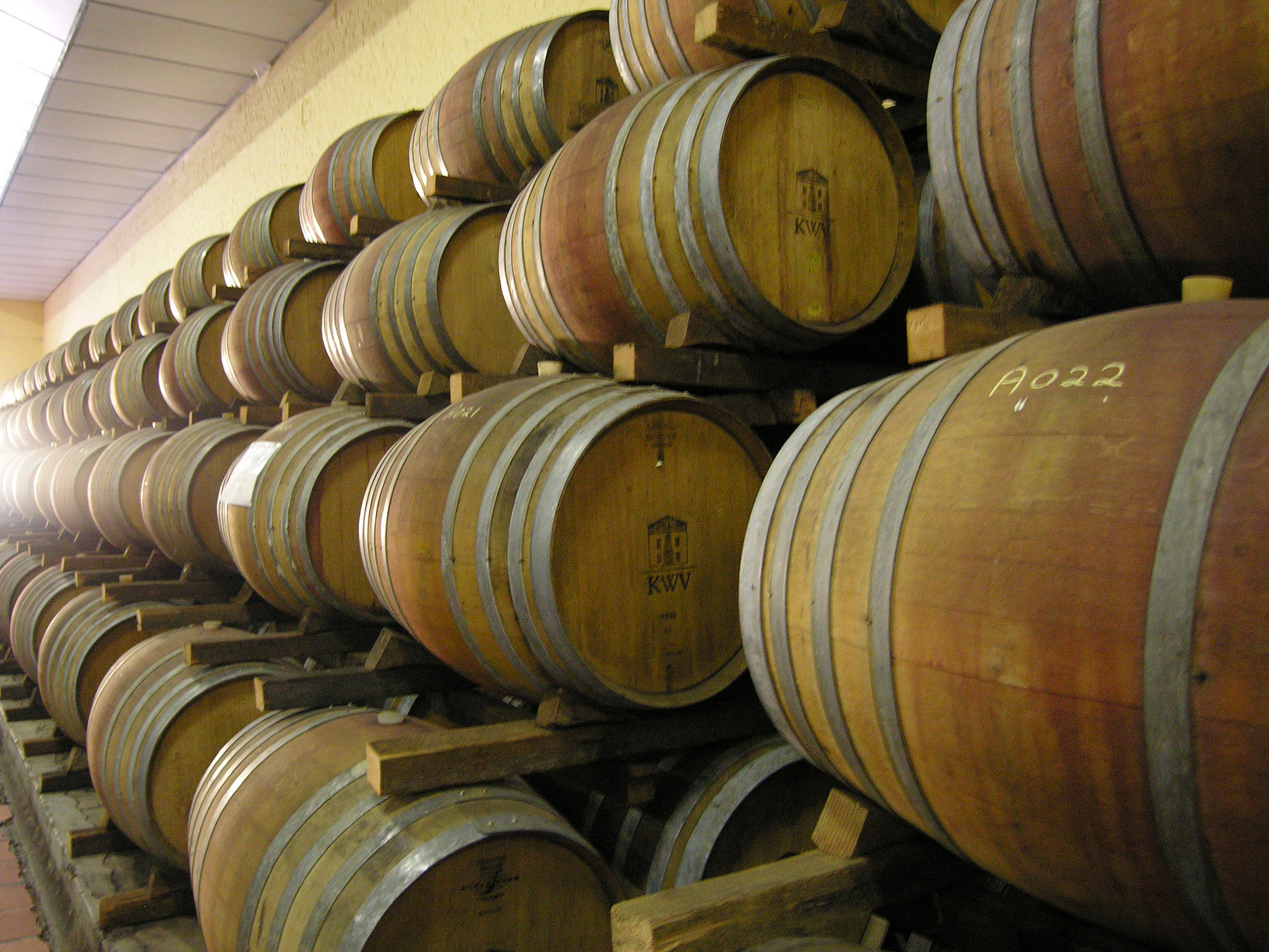 Cave de vieillissement de la Koöperatieve Wijnbouwers Vereniging